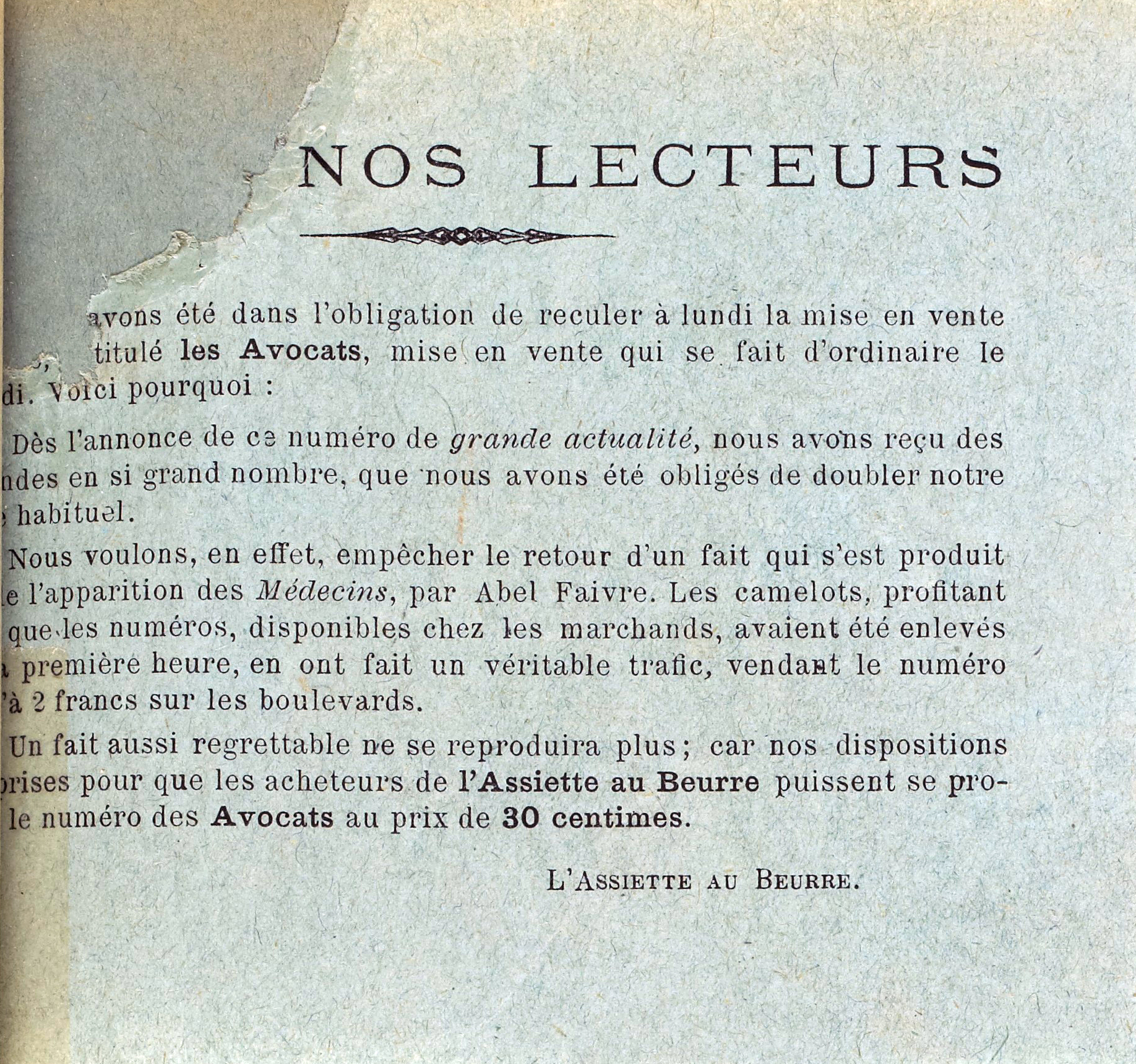 Encart